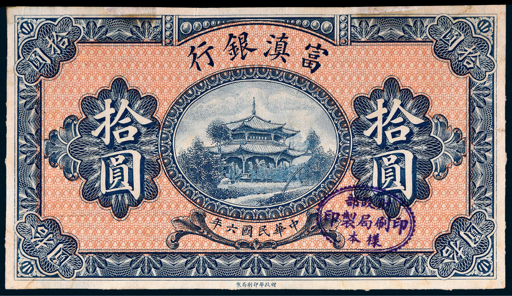 富滇银行民国六年10元券，财政部印刷局印制样本